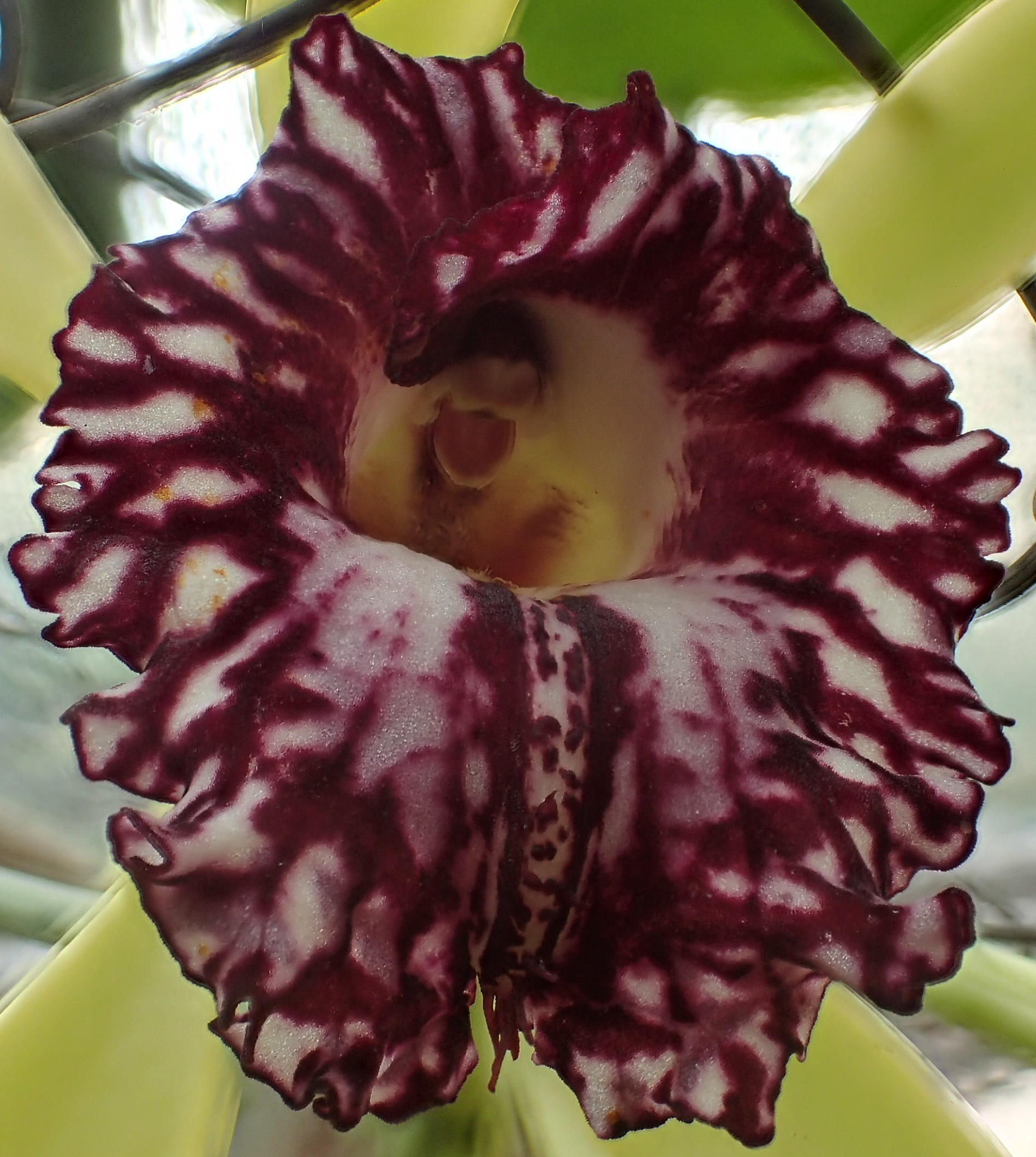 Labelle épais, charnu à marge fortement ondulé